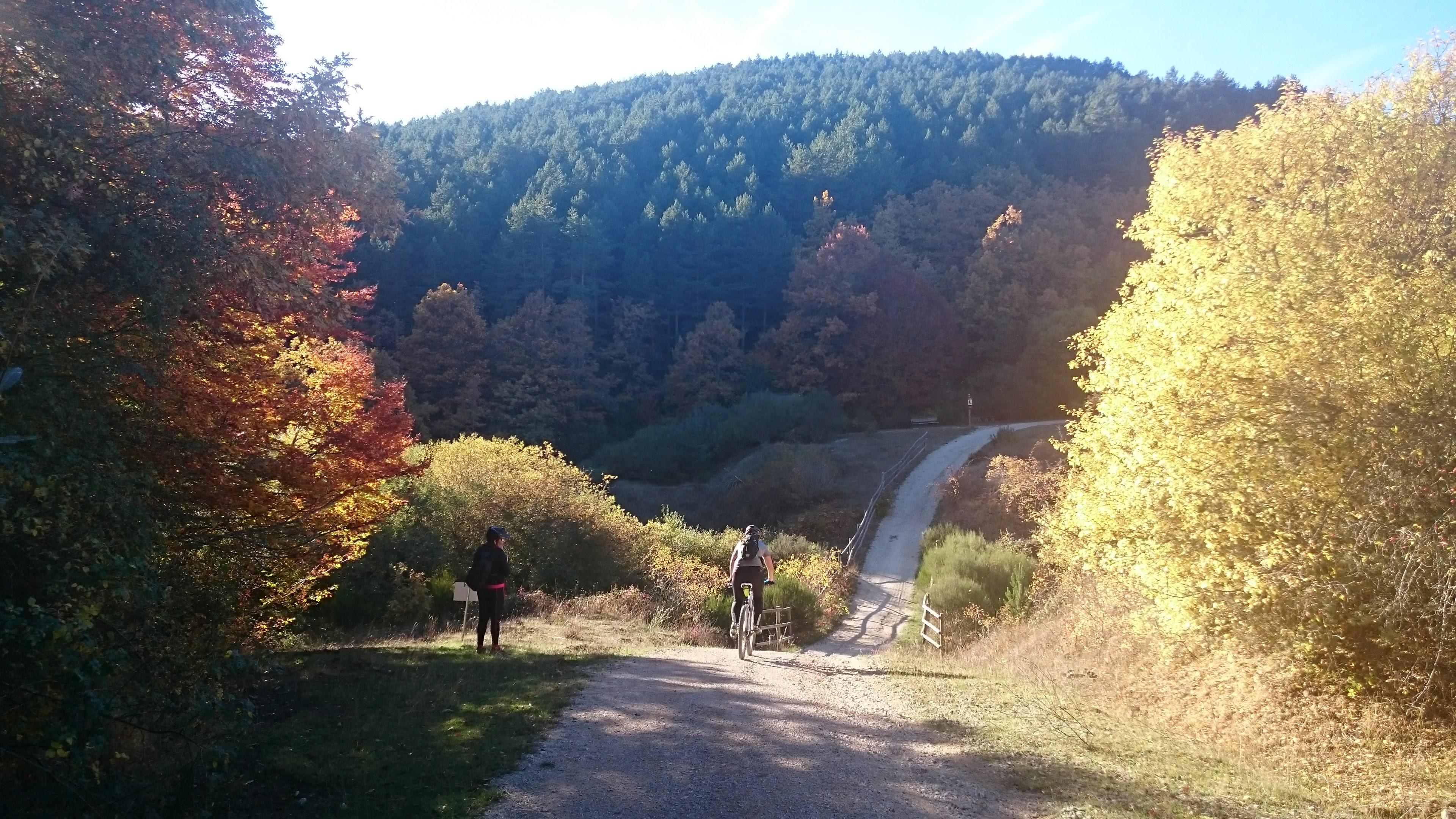 Vía Verde de la Sierra de la Demanda en otoño (2016)